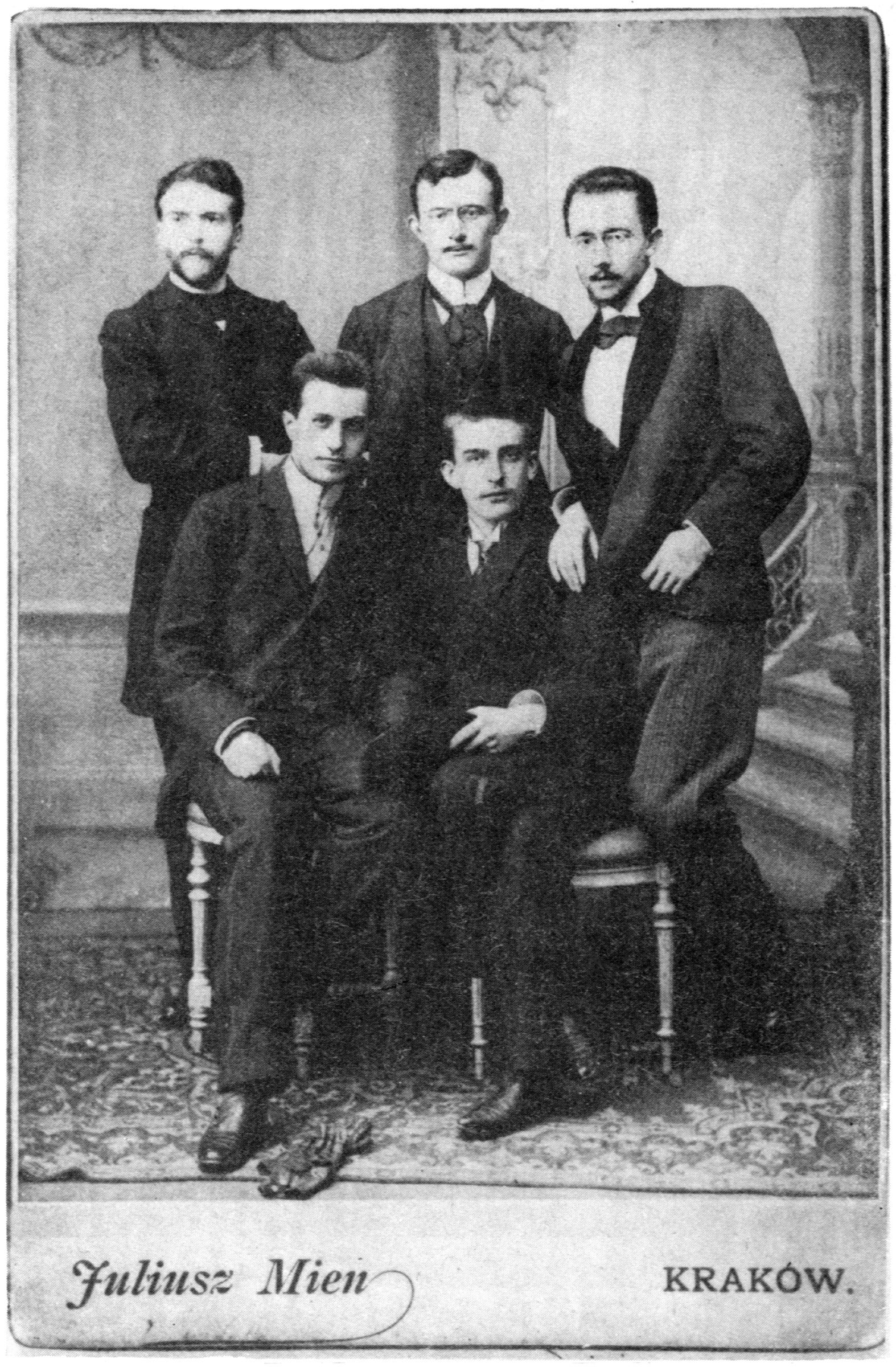 Stoją od lewej: Stanisław Wyspiański, Lucjan Rydel, Karol Maszkowski; siedzą od lewej Henryk Opieński, Stanisław Estreicher.